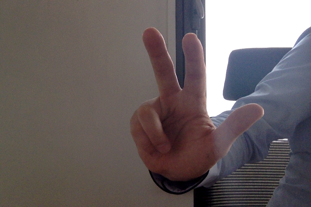 Salut à trois doigts traditionnel serbe